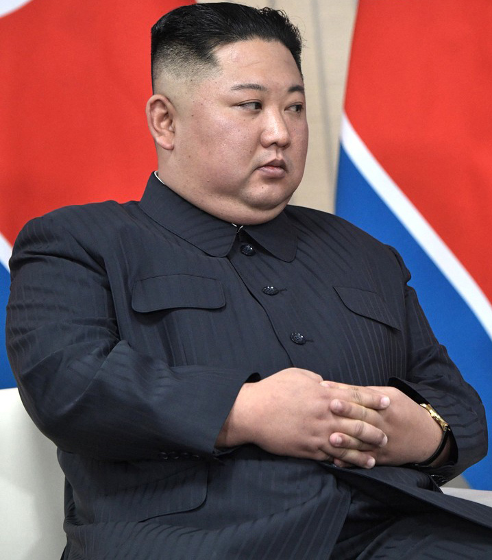 Переговоры Президента Российской Федерации Владимира Путина с Председателем Государственного совета Корейской Народно-Демократической Республики Ким Чен Ыном. Россия, Владивосток, остров Русский.